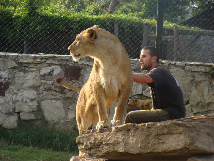 Fotografía de uno de los leones del Zoológico Batán.